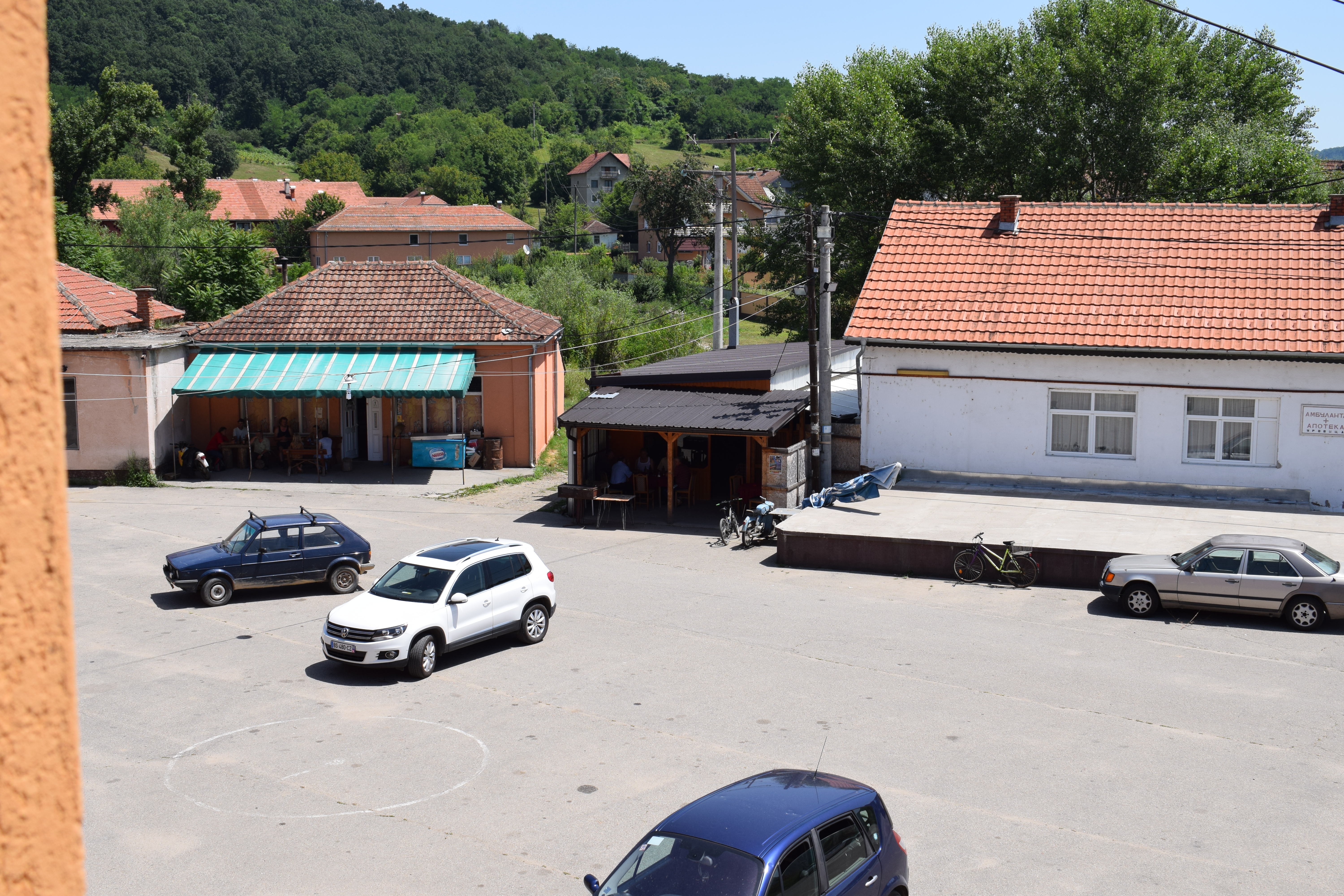 Das Dorfzentrum auch Centar genannt in Urovica